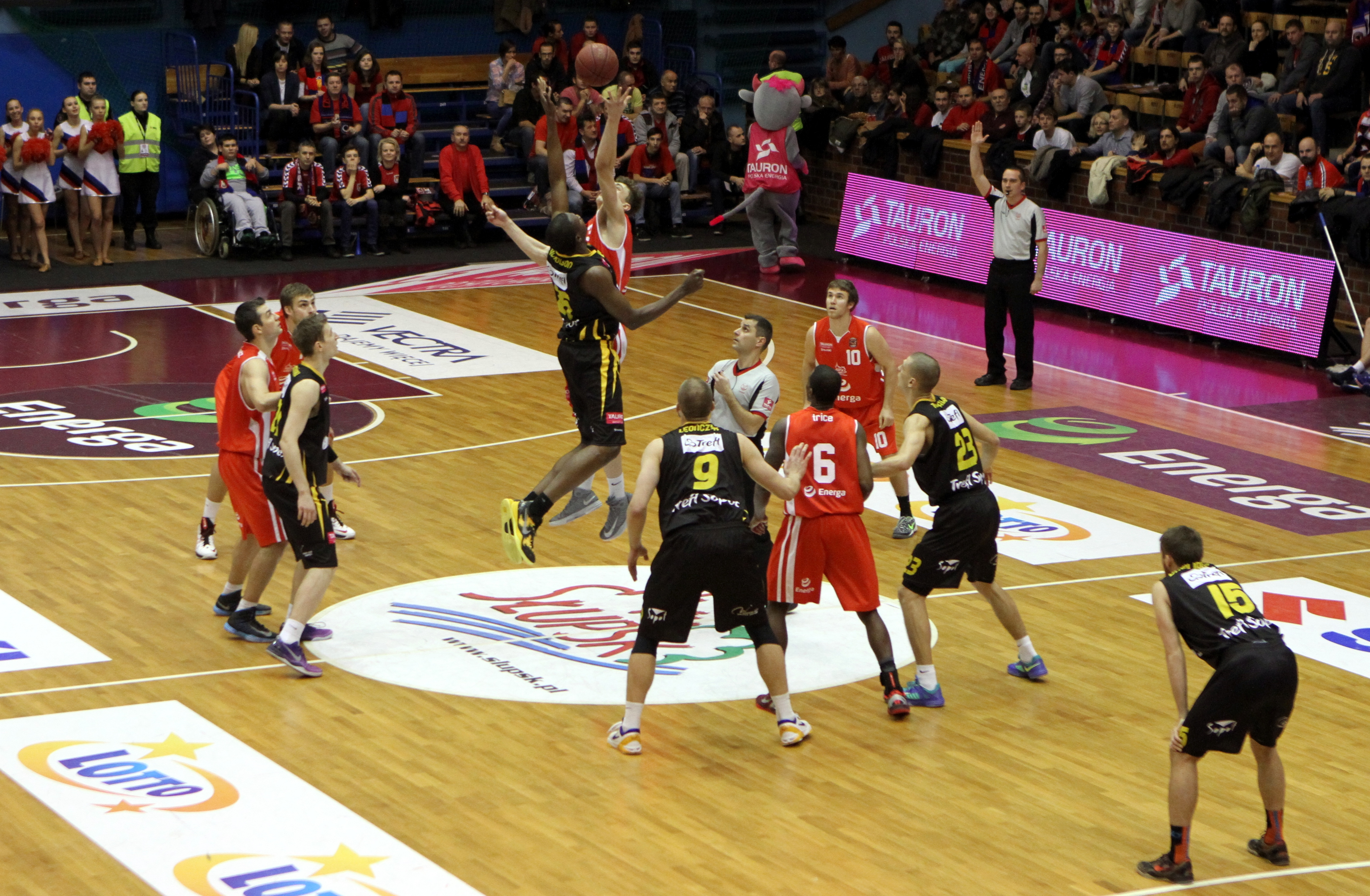 Energa Czarni Słupsk, Treﬂ Sopot, Tauron Basket Liga